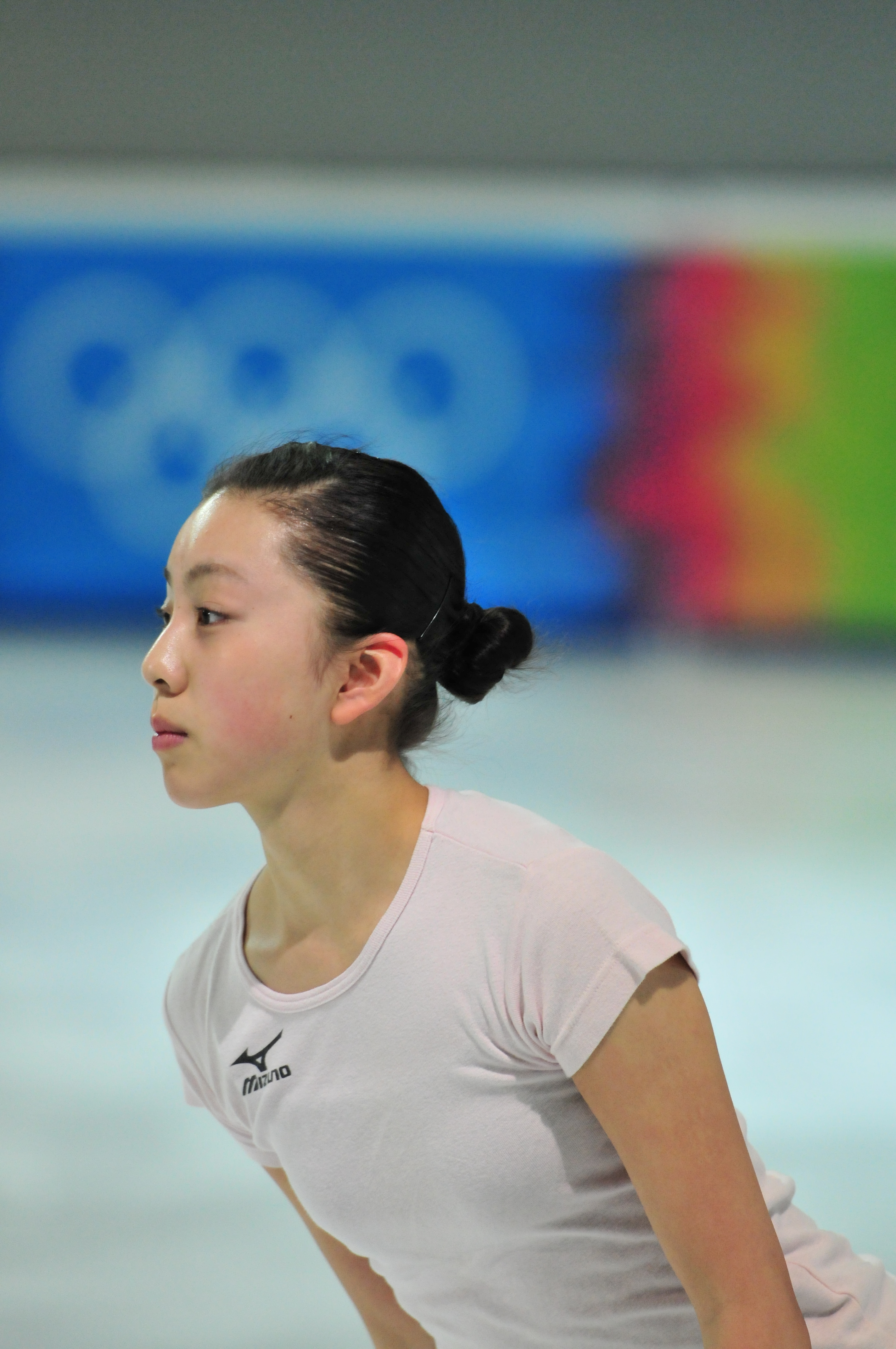 1. Jugendolympiade 2012 Innsbruck